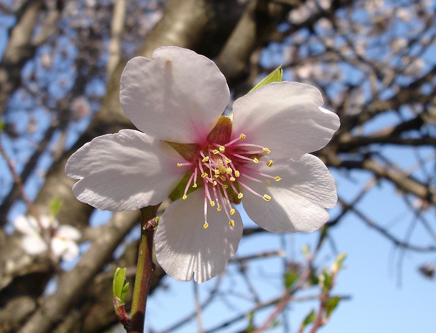 Fleur d'amandierPhoto prise à Camélas en mars 2005 Jean Tosti 2005